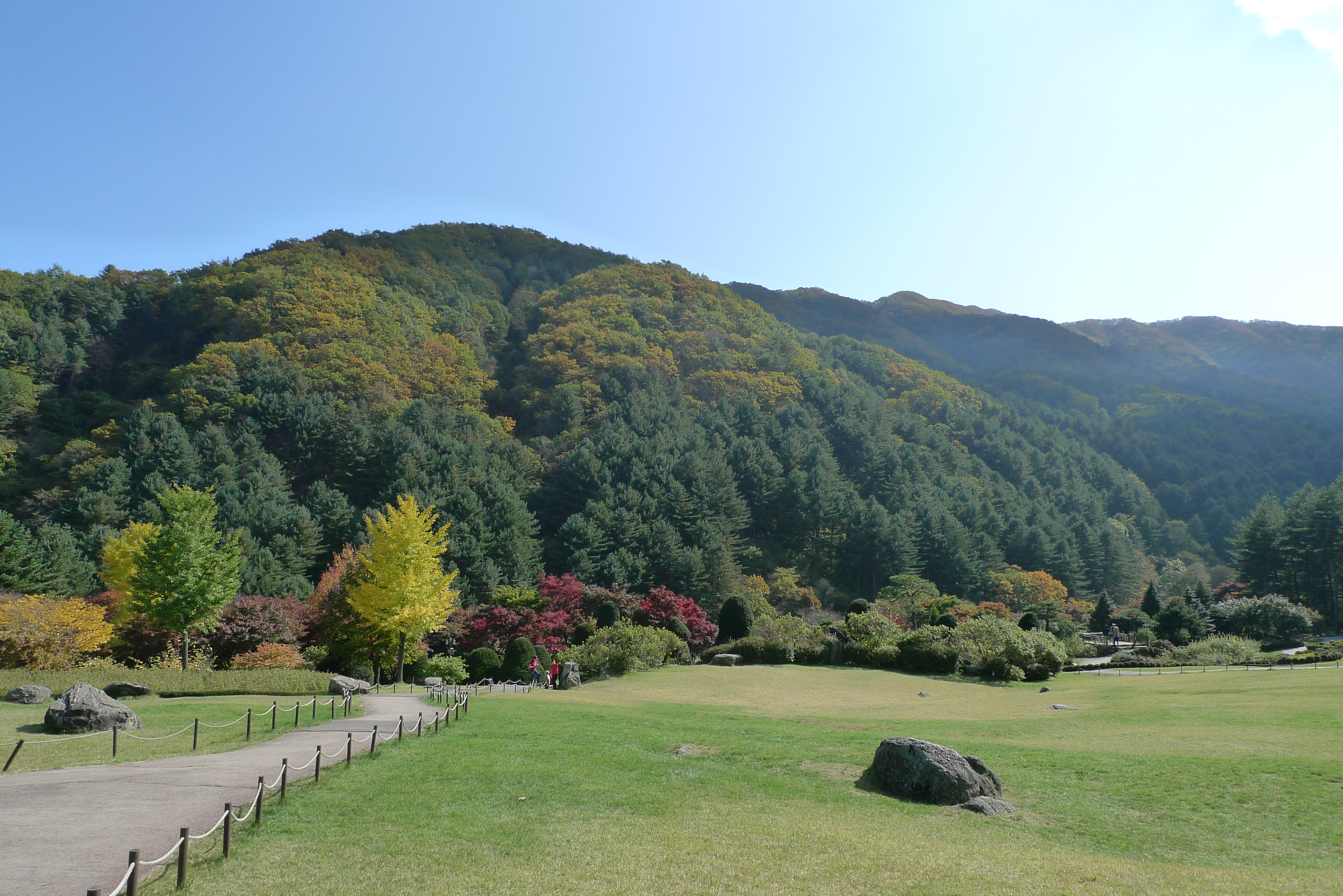 아침고요수목원 가을 풍경